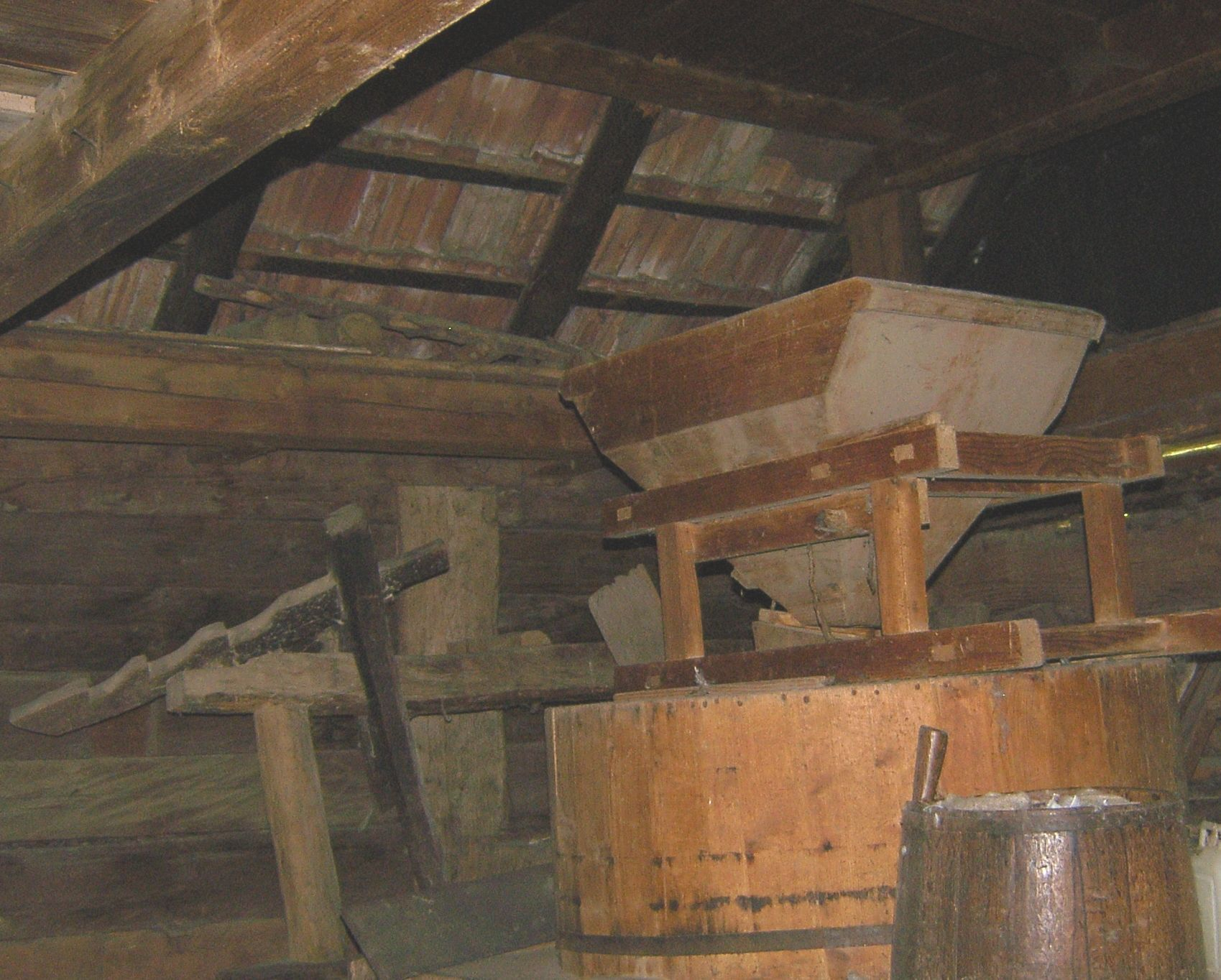 A kiskalotai malom belülről